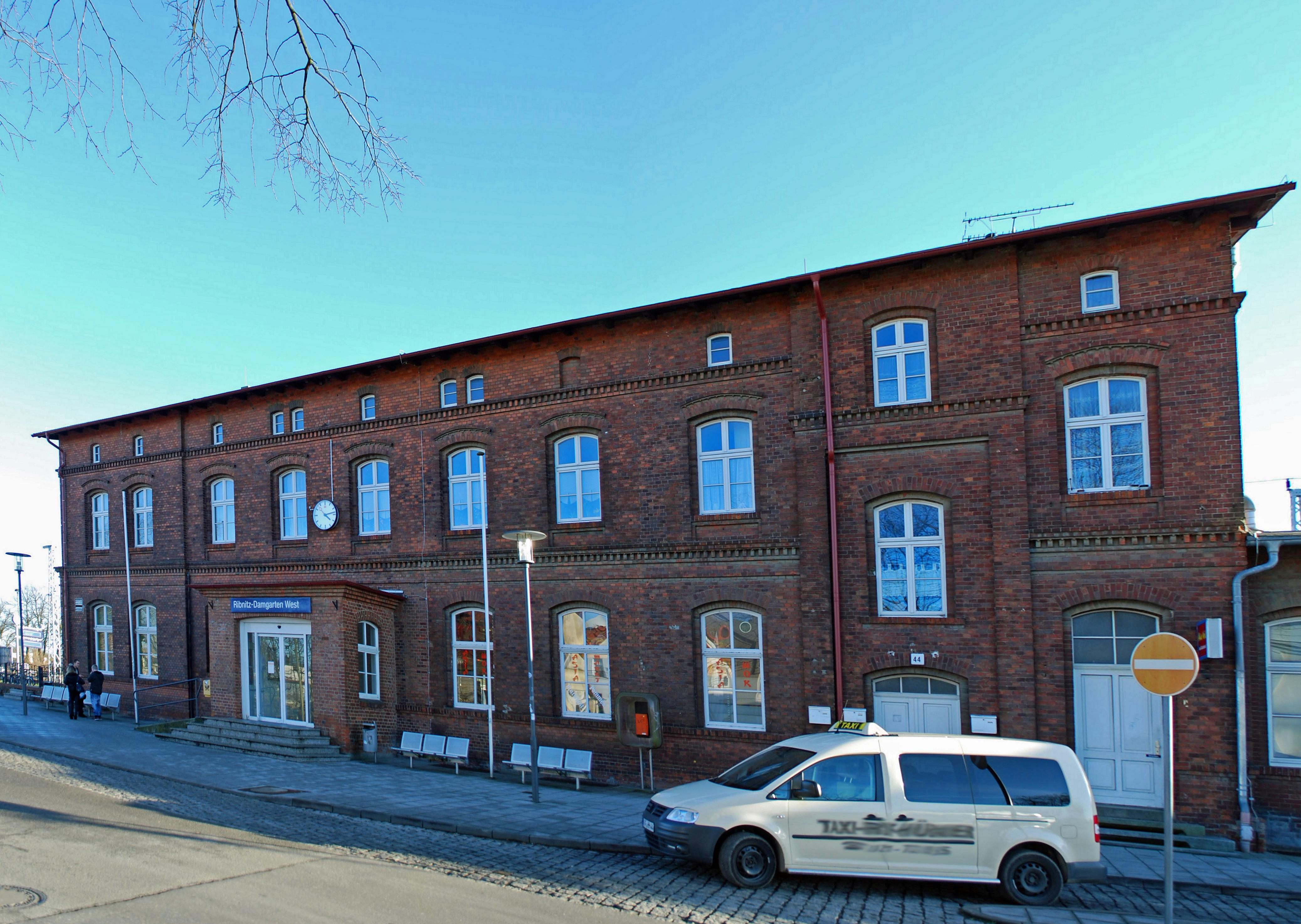 Gebäude und Denkmal in Ribnitz-Damgarten